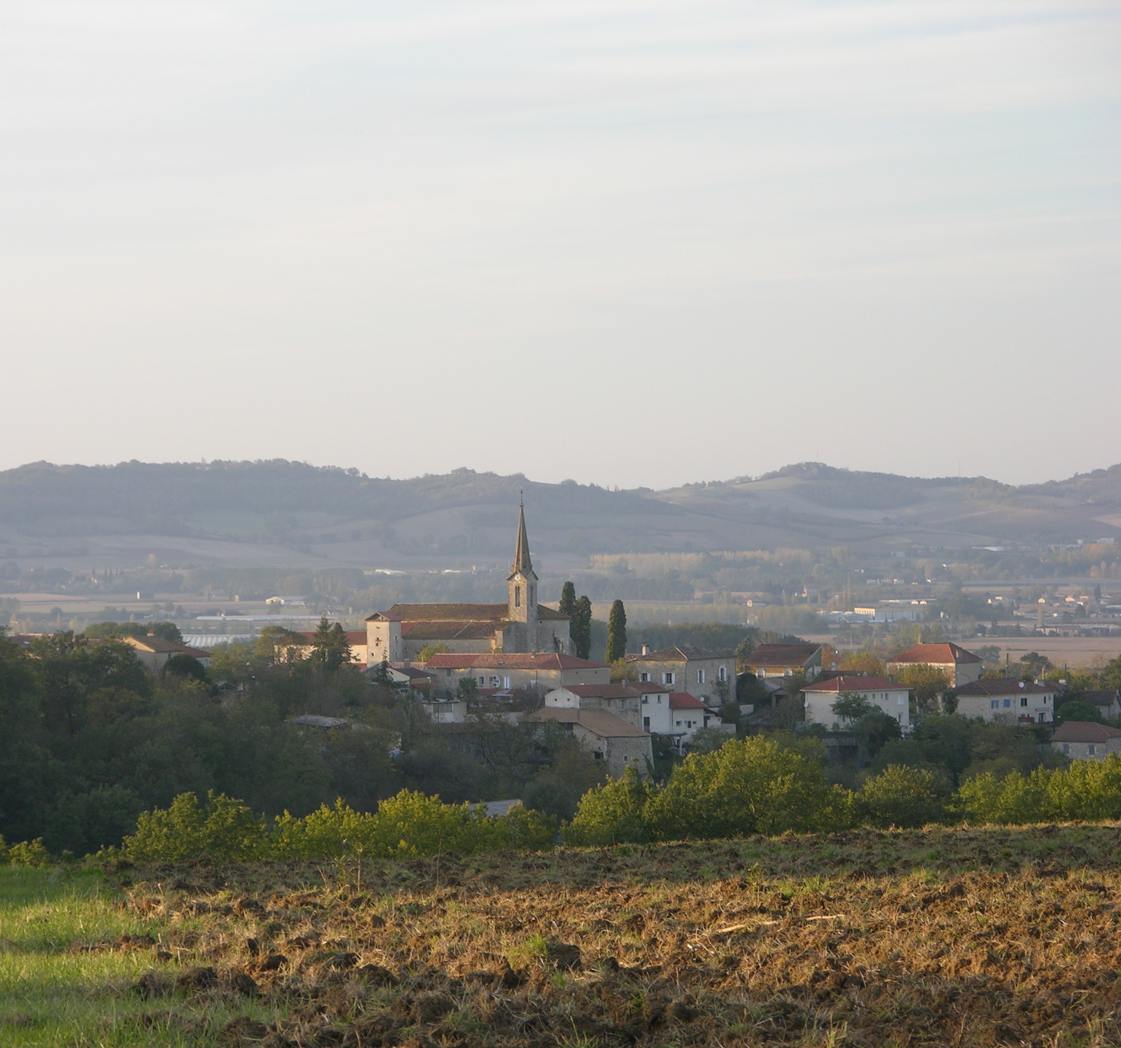 Panorama de Galapian, depuis le plateau de Crabé, au sud du village.